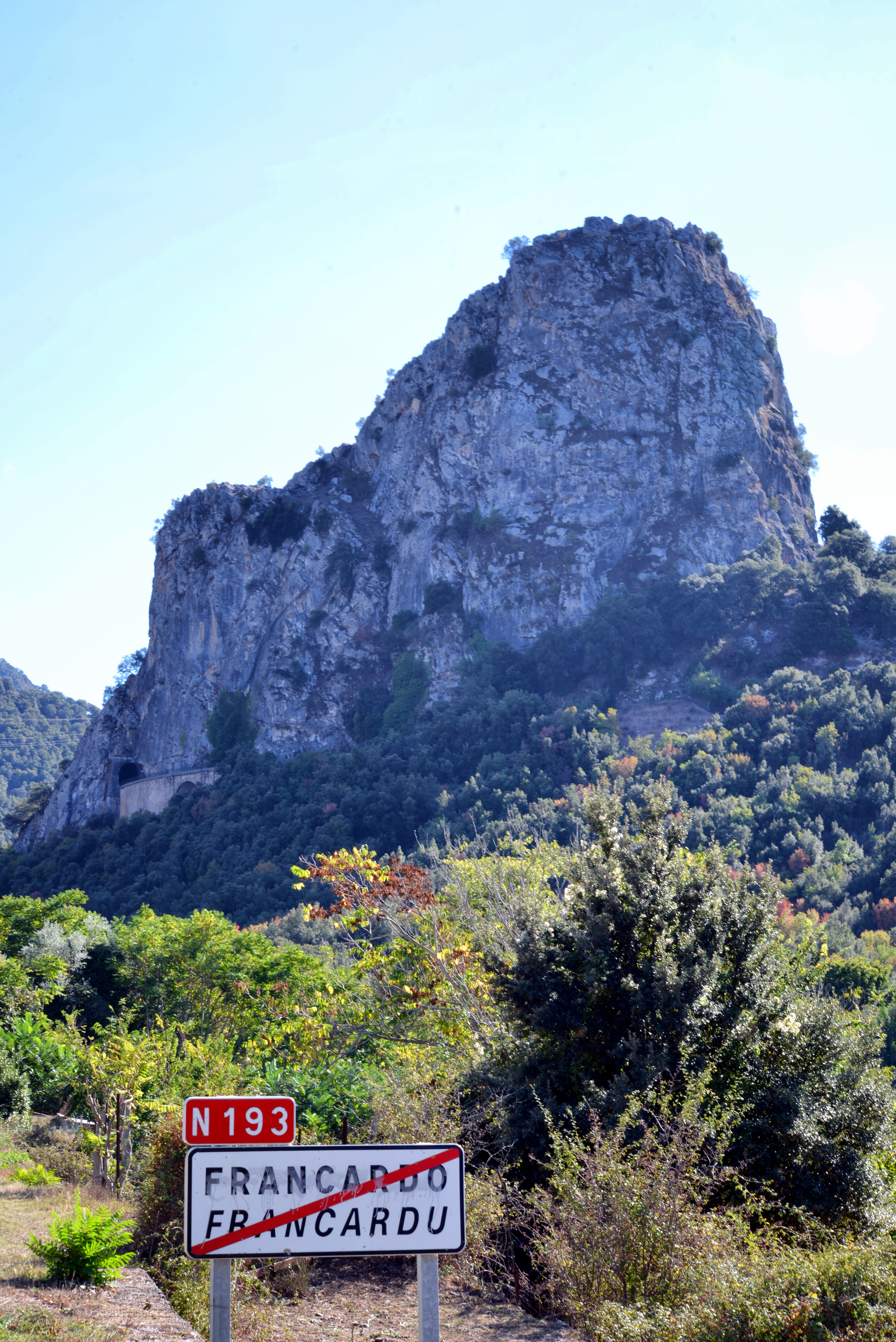 Omessa, Talcini (Corse) - Le monte Pollino (456 m) au nord du massif calcaire du Monte a Supietra et le tunnel ferroviaire de Caporalino